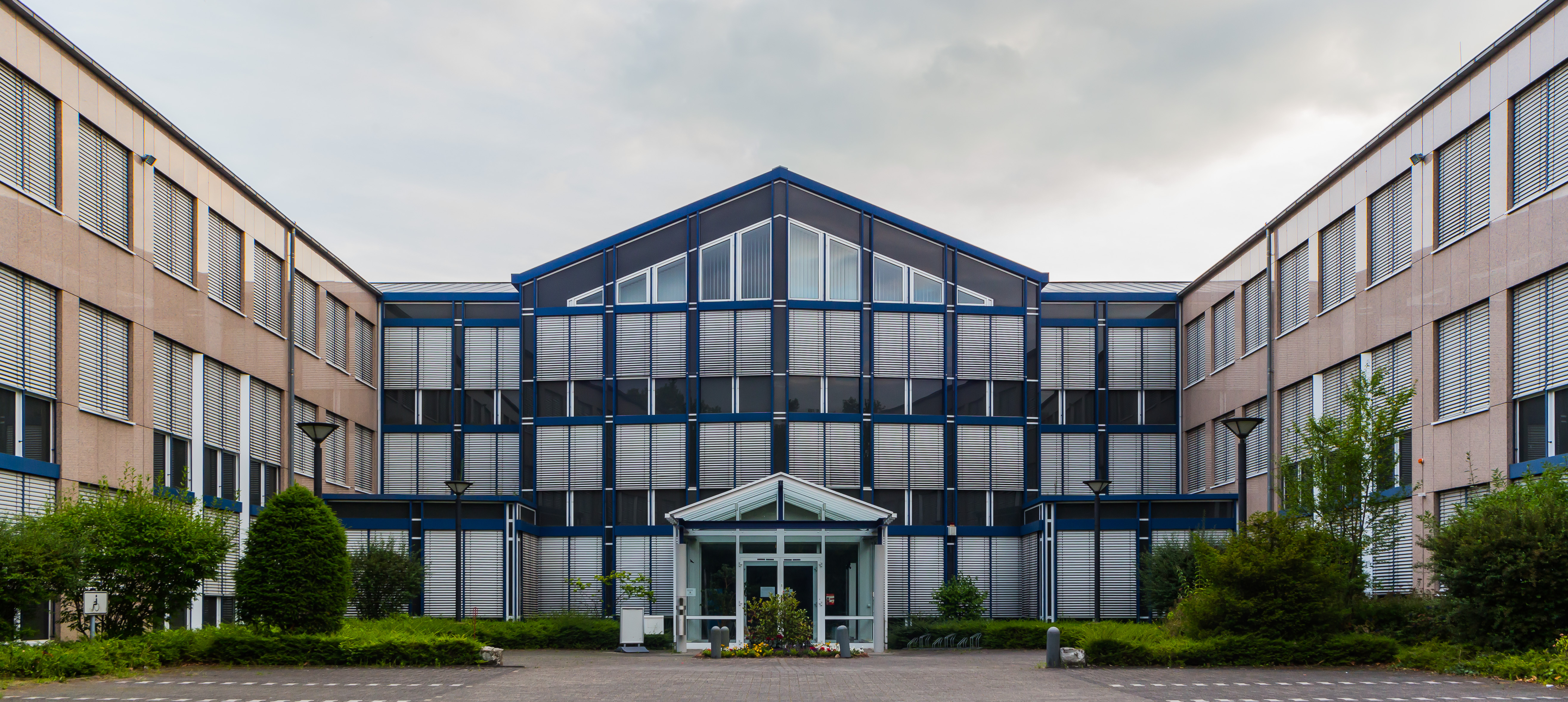 Unternehmenssitz der Tank & Rast, Andreas-Hermes-Straße 7–9, Bonn-Hochkreuz